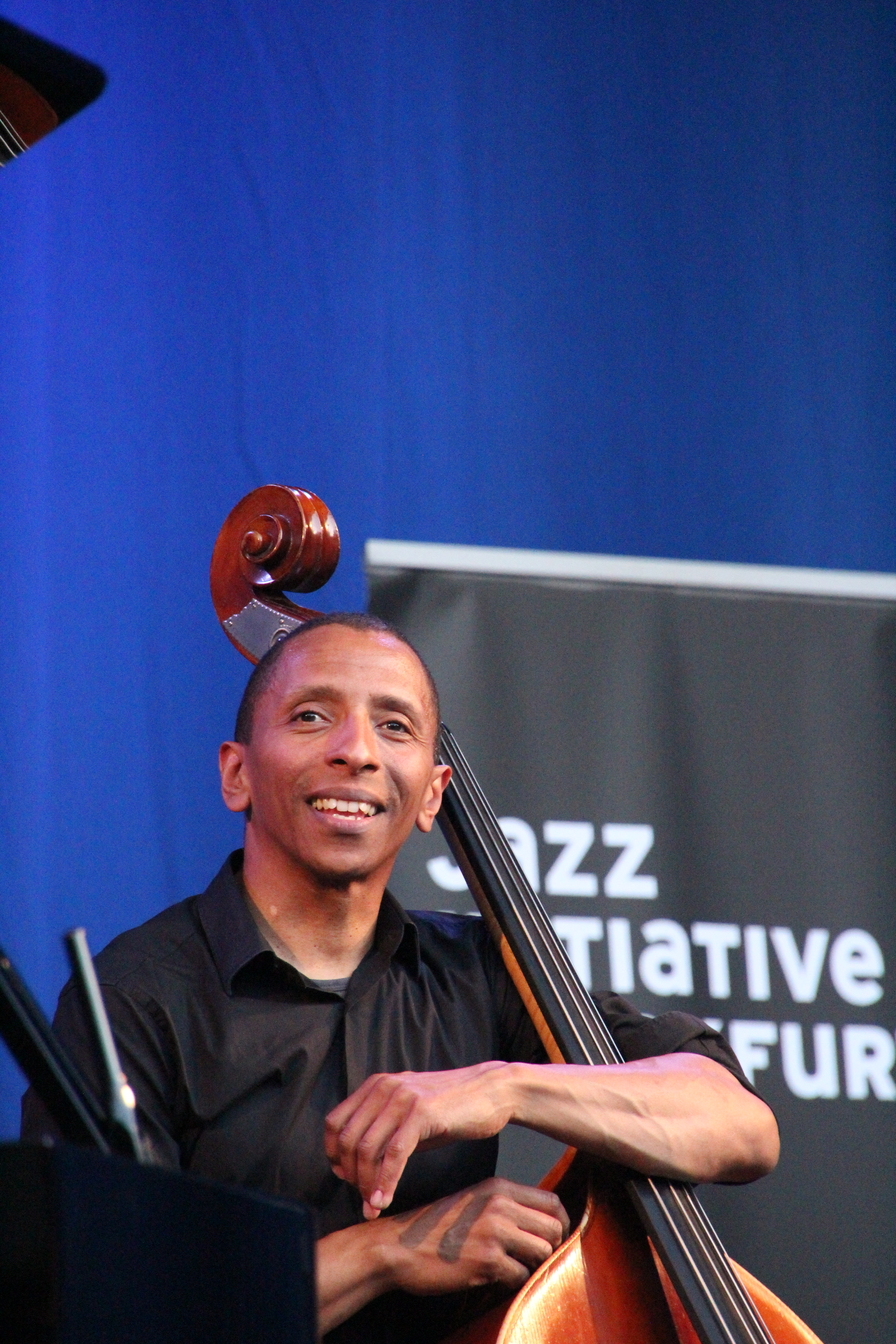 Bildinhalt: Omar Rodriguez Calvo, kubanischer Jazzbassist, bei einem Auftritt mit dem Tingvall-Trio im Frankfurter Palmengarten Aufnahmeort: Frankfurt am Main, Deutschland Die dargestellte Person wurde bei einem öffentlichen Auftritt fotografiert.